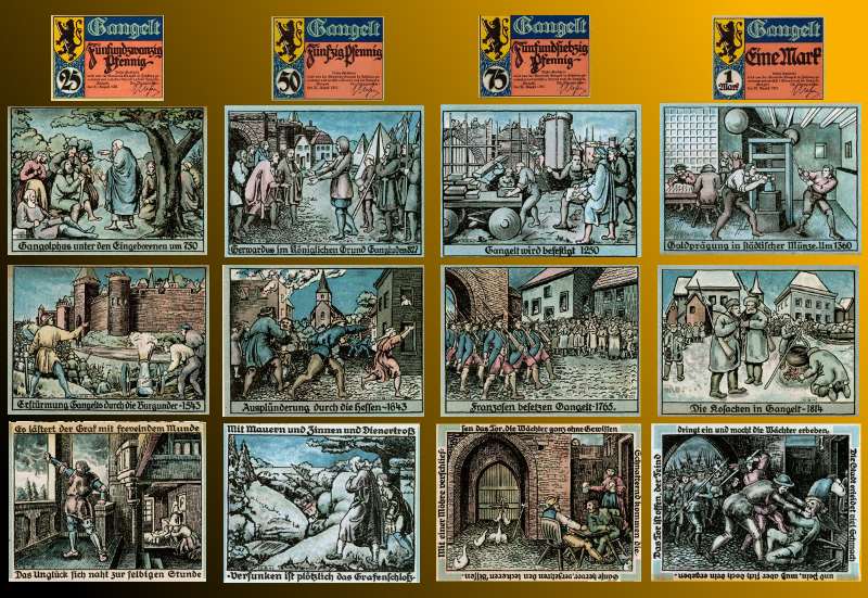 Zur Zeit des ersten Weltkrieges wurden von Städten, Gemeinden und privaten Unternehmen eigenes Geld in Umlauf gebracht, um den Mangel an staatlichen Geldes auf Grund einer Inflation entgegen zu wirken. Dieses Geld wurde jedoch nur regional begrenzt akzeptiert. Auch die Gemeinde Gangelt lies 1921 eigenes Geld im Wert von 25 Pfennig bis eine Mark drucken. Die Rückseite verzierten Motive aus der Geschichte Gangelts.